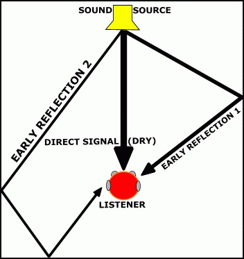 Ensimmäiset kaiut